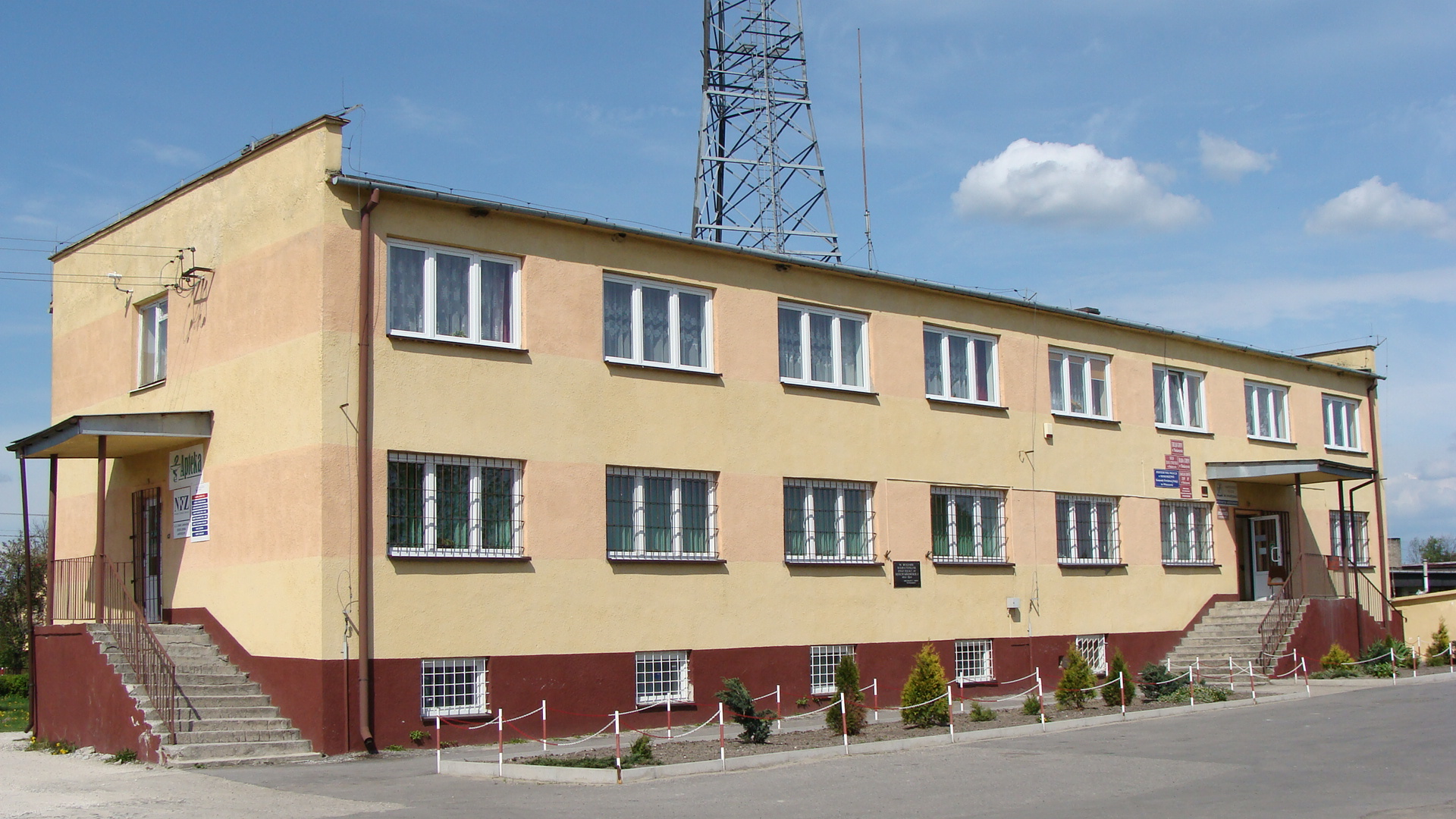 Urząd Gminy w Moskorzewie